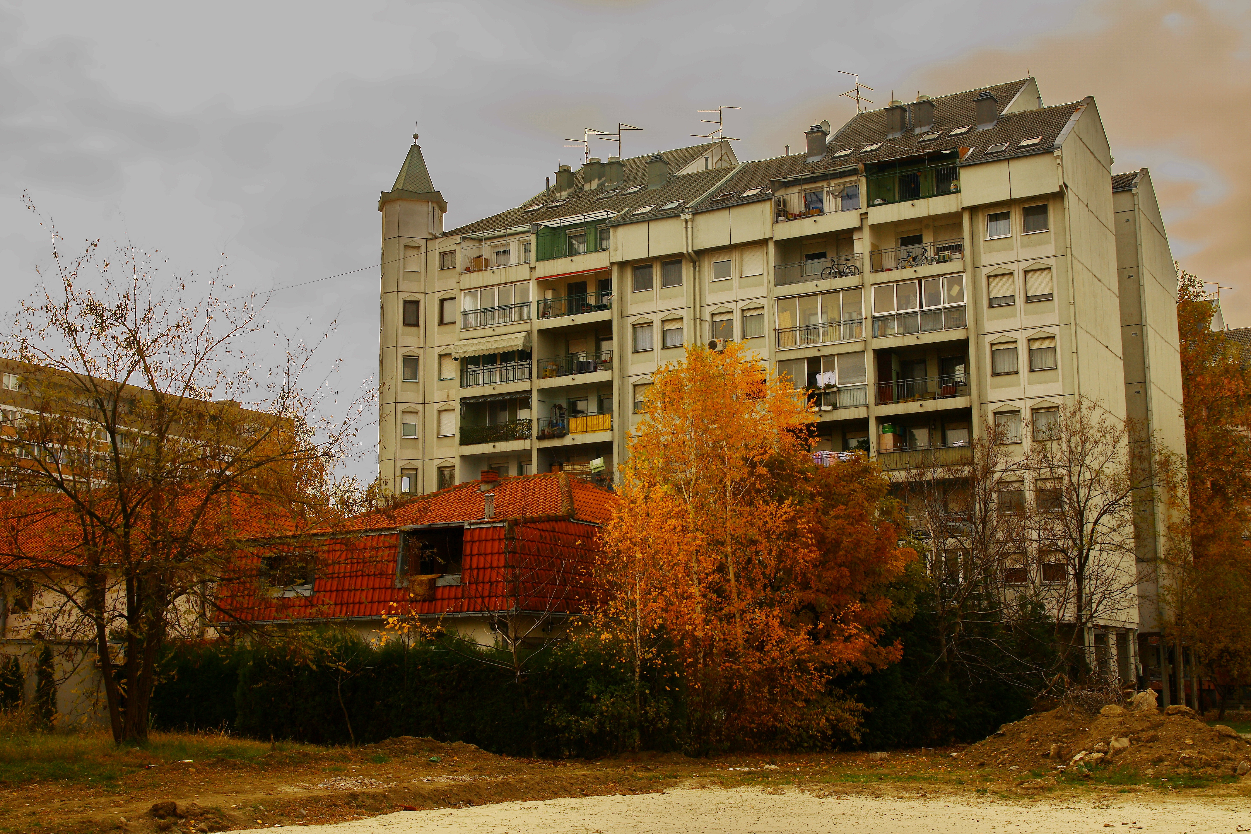 Retenzija